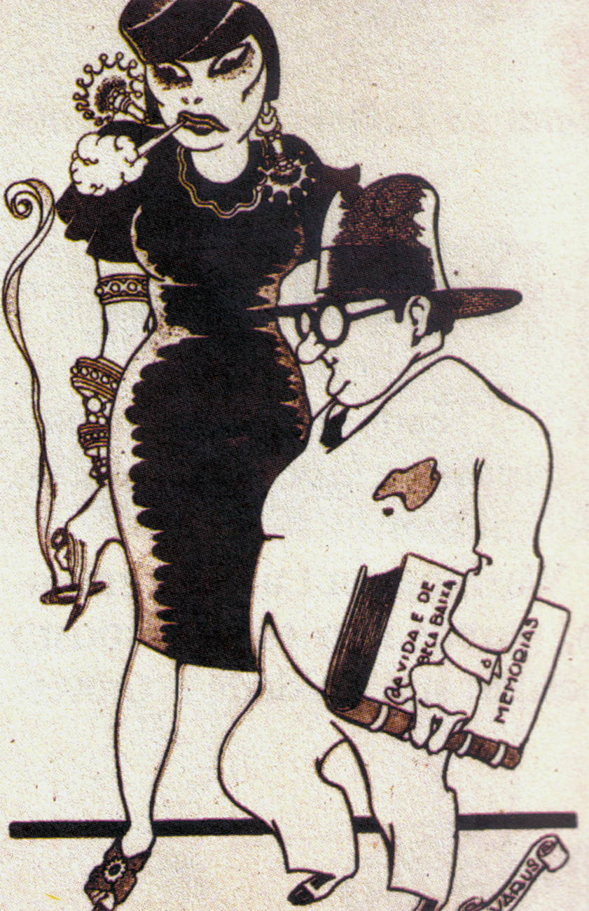 Casal Eugênia e Álvaro Moreyra, em caricatura de autoria de Alvarus